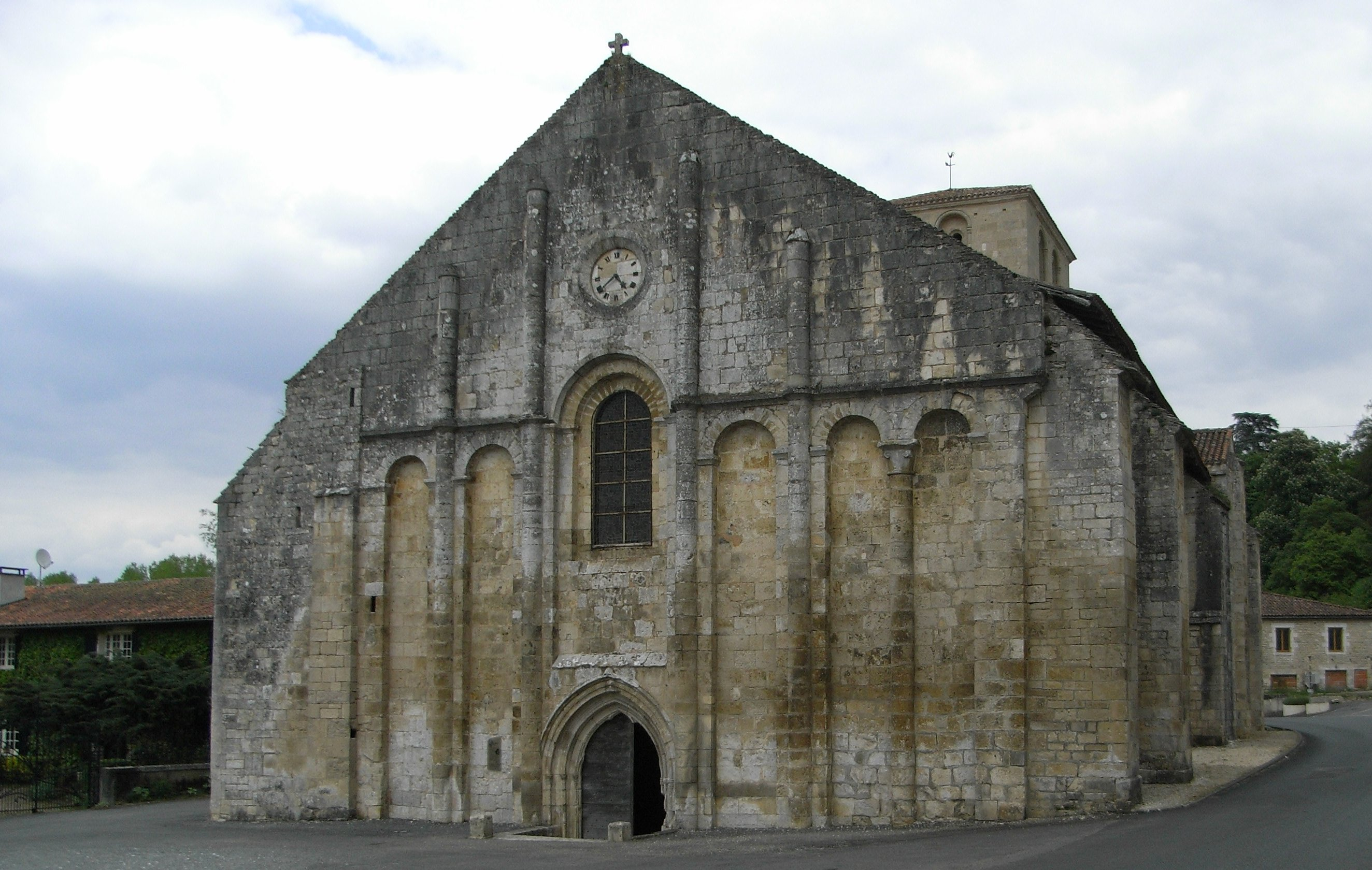 Église romane Saint-Nicolas à Cellefrouin en Charente (France).